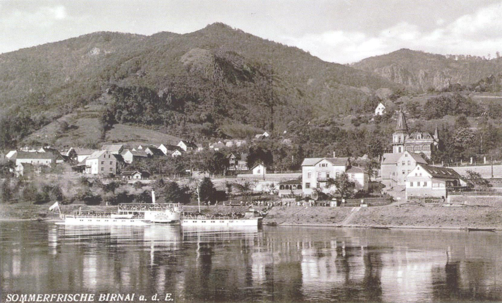 Sommerfrische Birnai a.d. Elbe